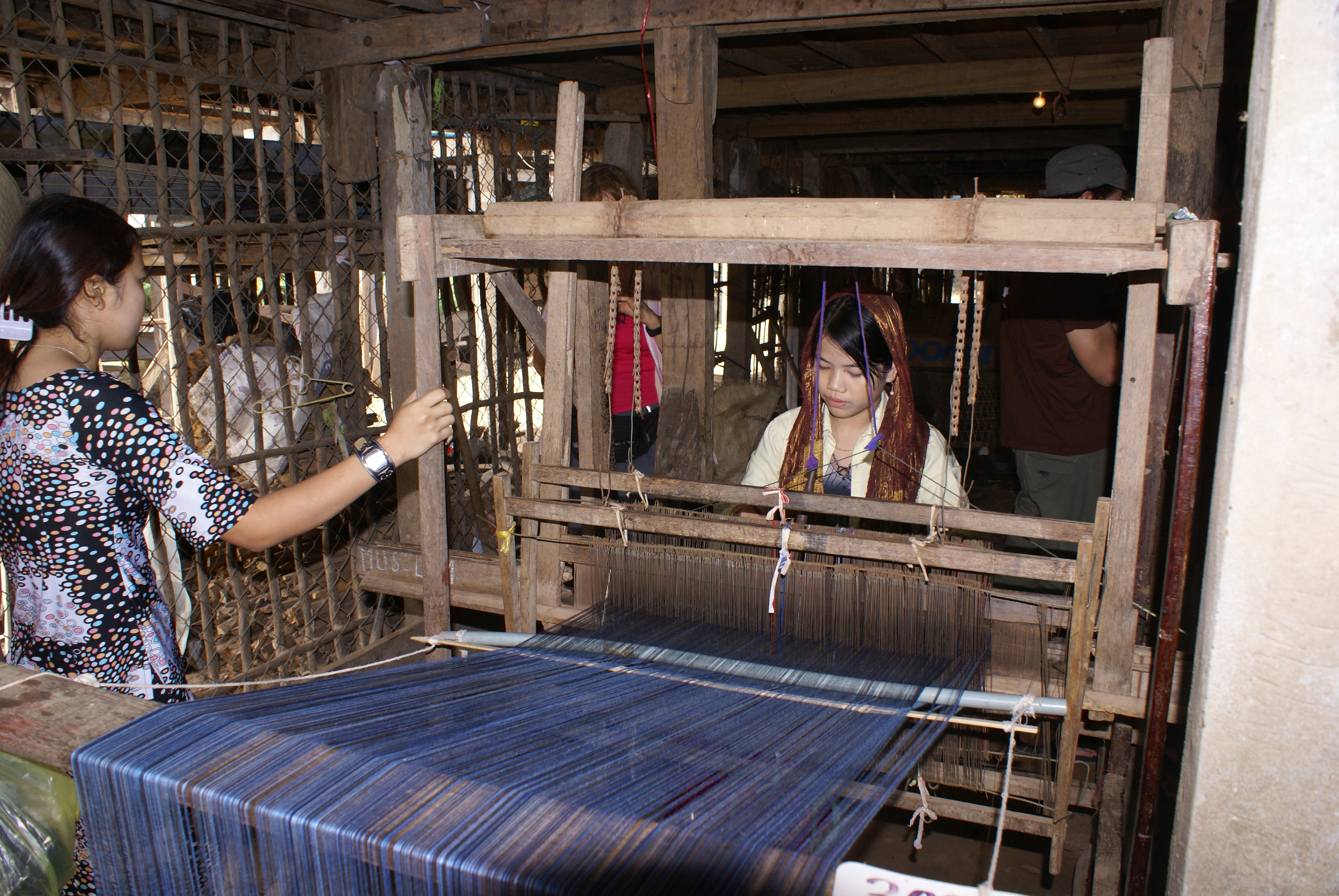 A woman at weaving loom in Đa Phước, An Phú, An Giang (near Chau Doc).